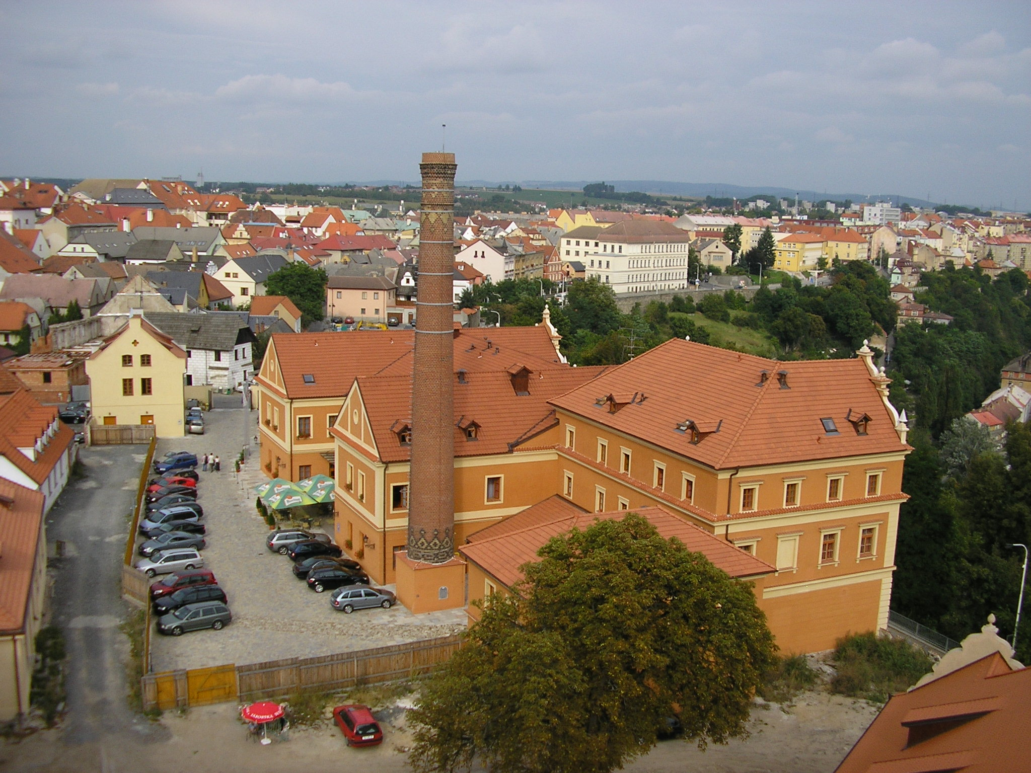 Hrad Kotnov a pivovar, Kotnov 127, Tábor, Tábor.